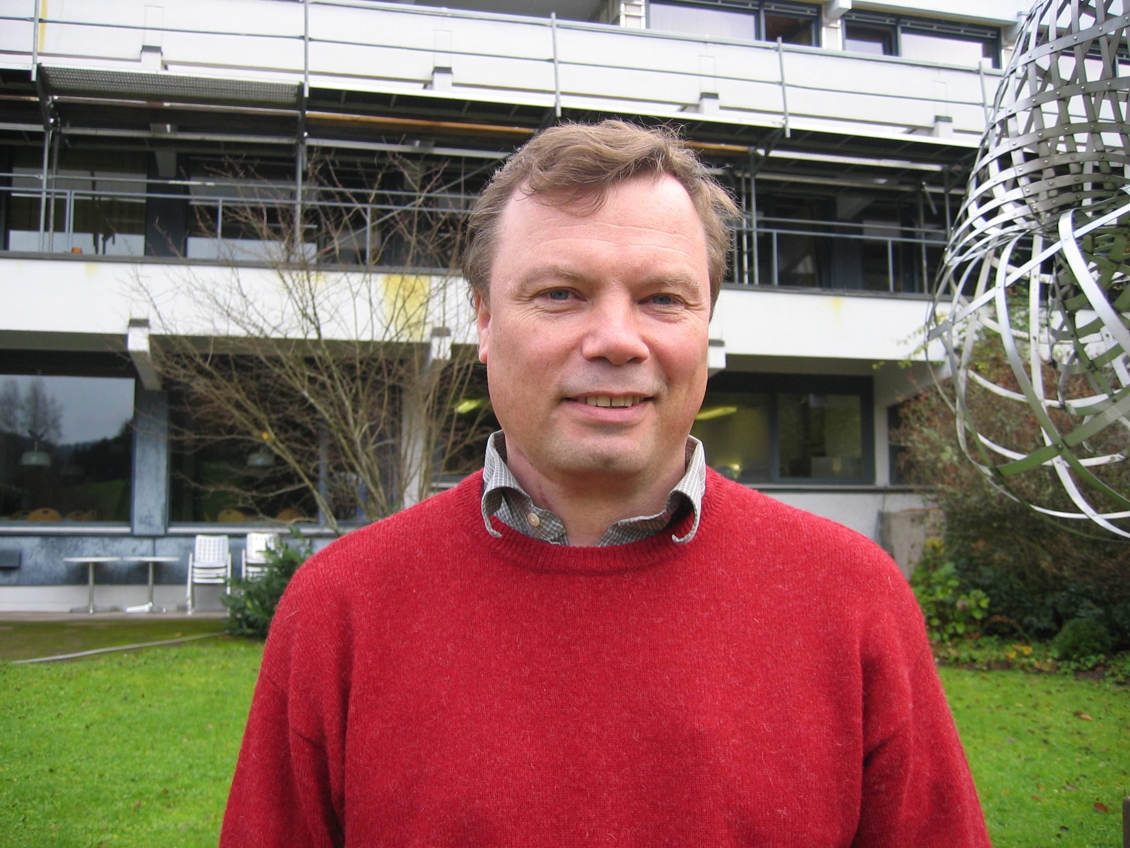 Den russiske matematiker Nikolaj Resjetikhin.